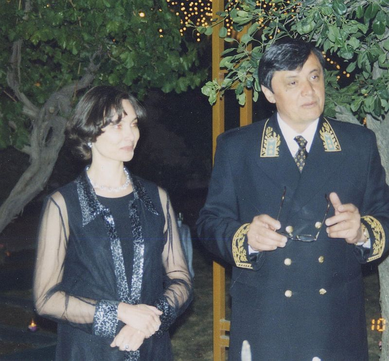 Zamir Kabulov